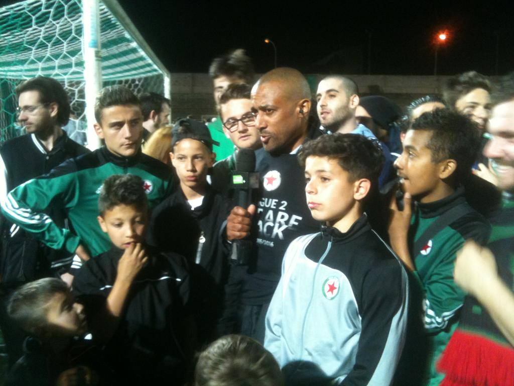 Steve Marlet entouré de jeunes au soir de l'accession du club en Ligue 2.